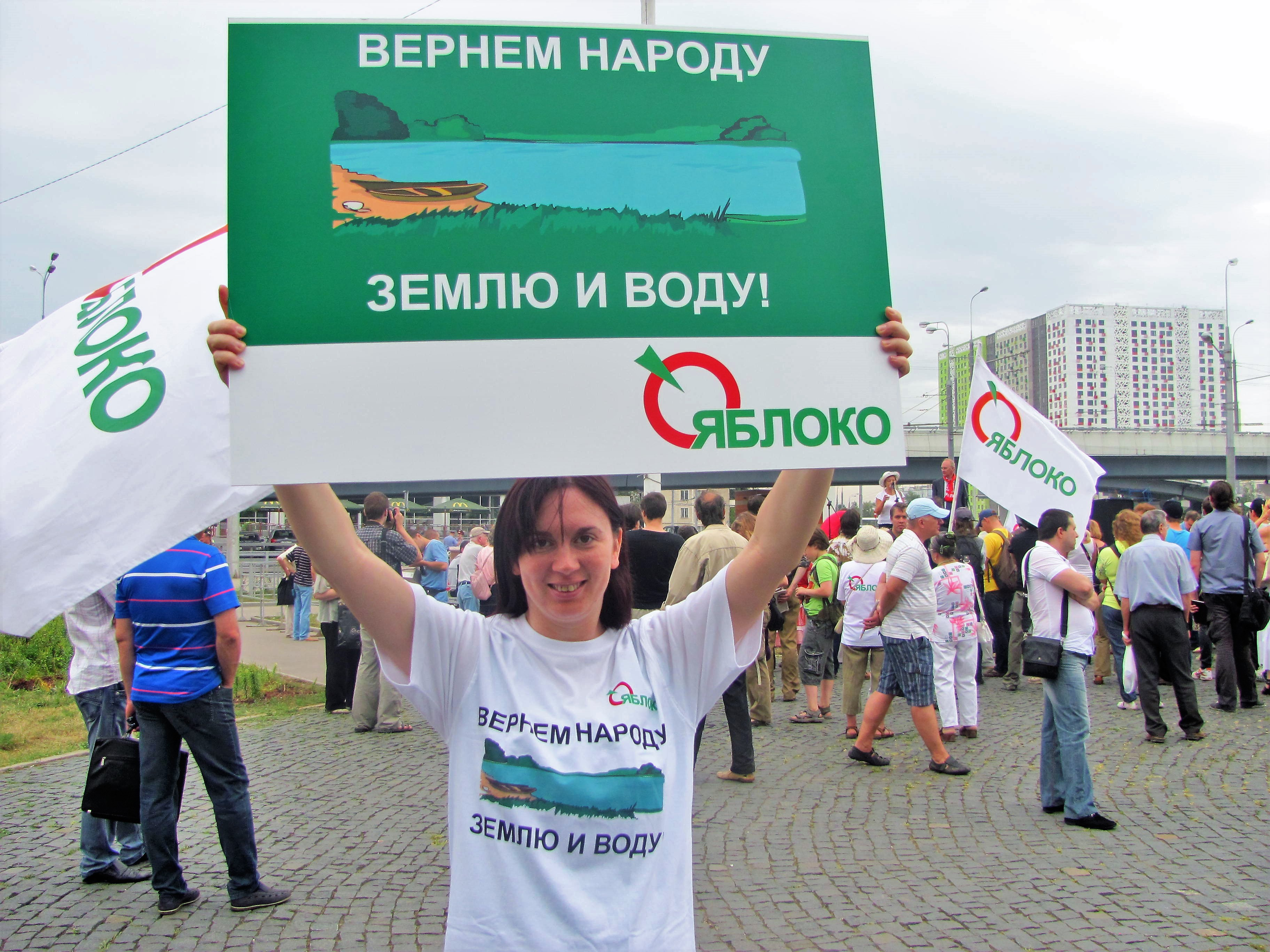 Пикет Российской партии ЯБЛОКО. На плакате сказано: "Вернём народу землю и воду"